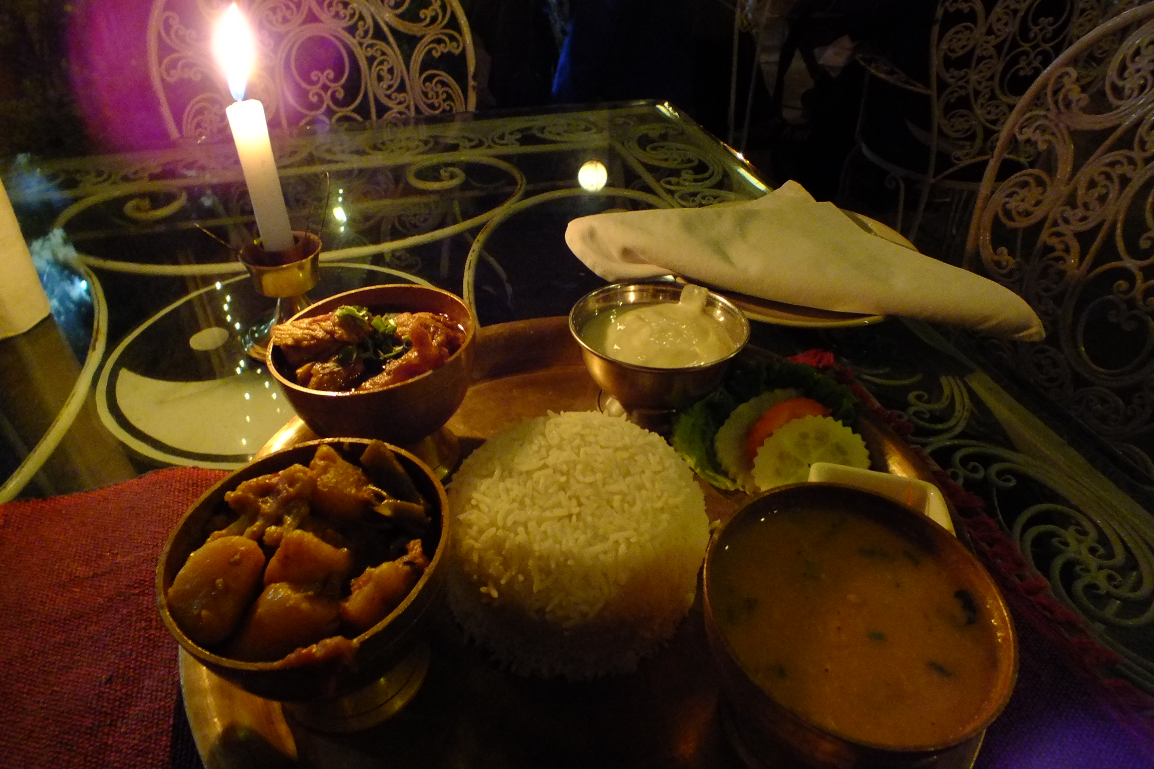 2015-03-09 Dalbath of Yin Yang Restaurant in Thamel, Kathmandu, Nepal ダルバート